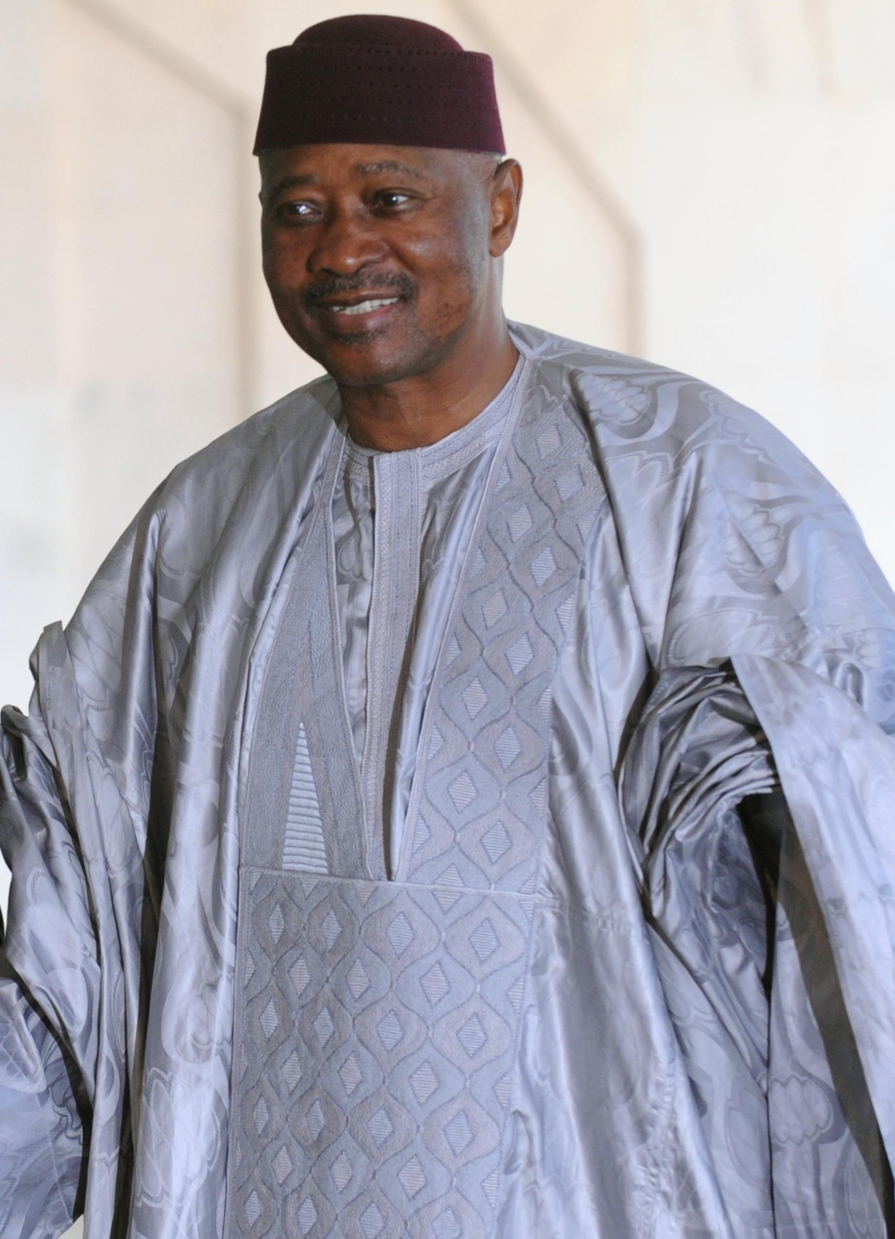 Brasília - O presidente Luiz Inácio Lula da Silva recebe o presidente do Mali, Amadou Tomani Touré, em visita oficial ao país (Antonio Cruz/ABr)